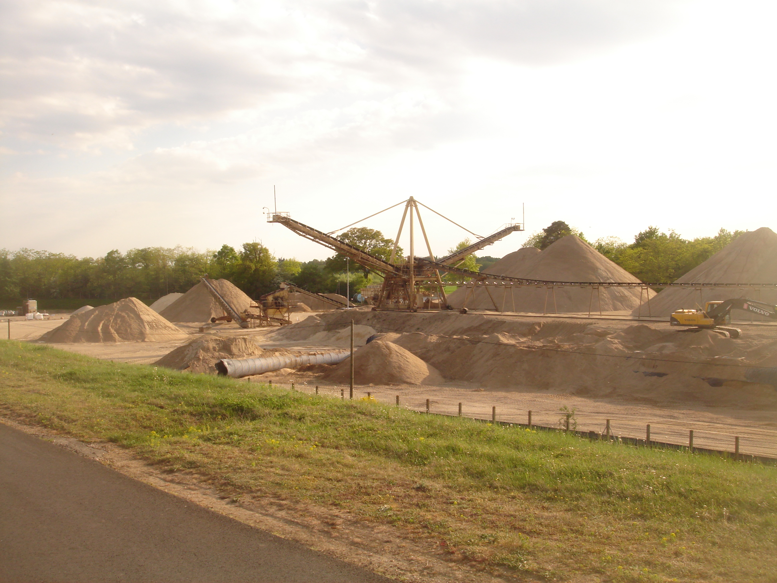 Carrière de Sandillon en bord de Loire, Loiret, Centre-Val de Loire, France